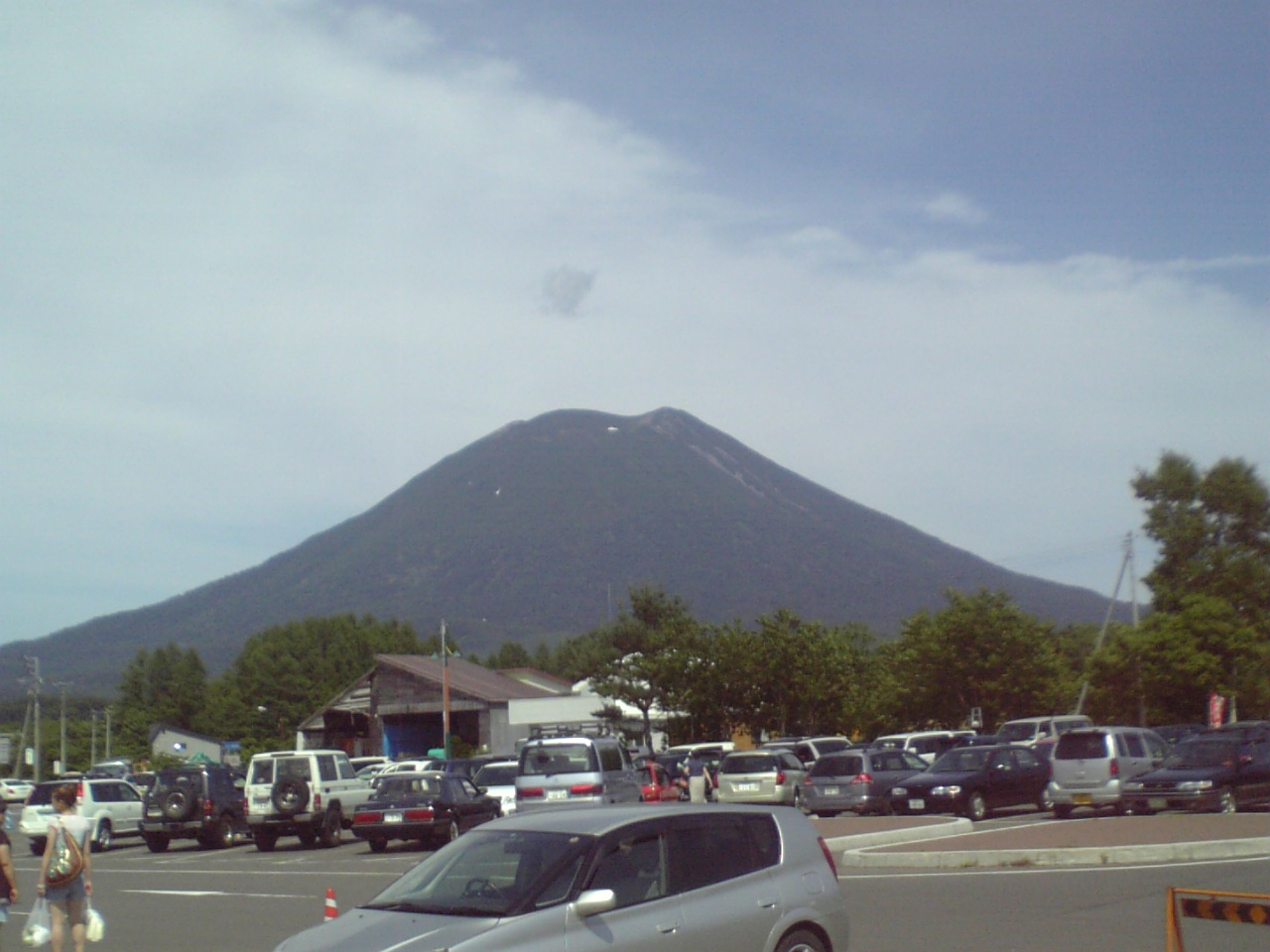 道の駅ニセコビュープラザから見る羊蹄山